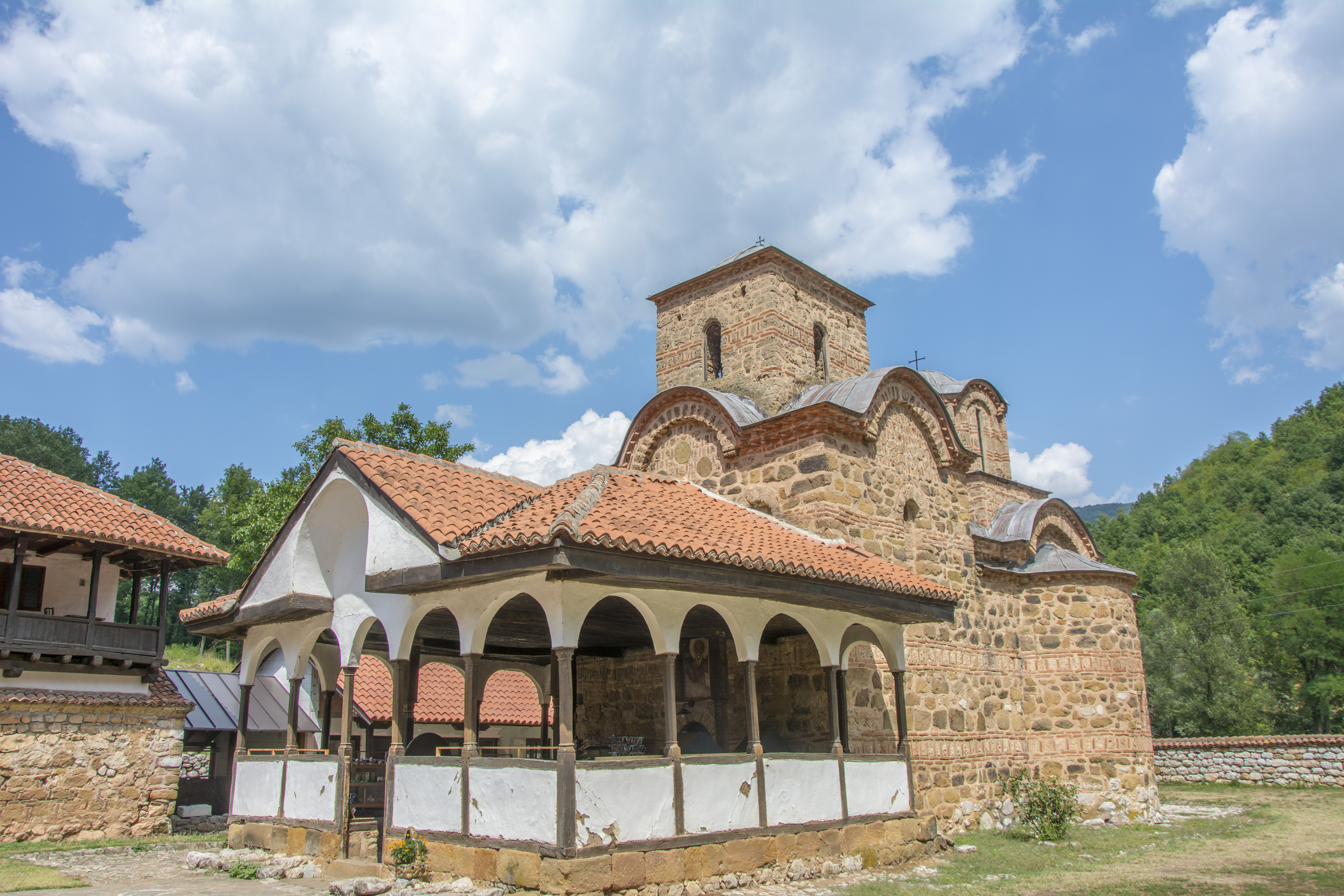 Poganovo manastir